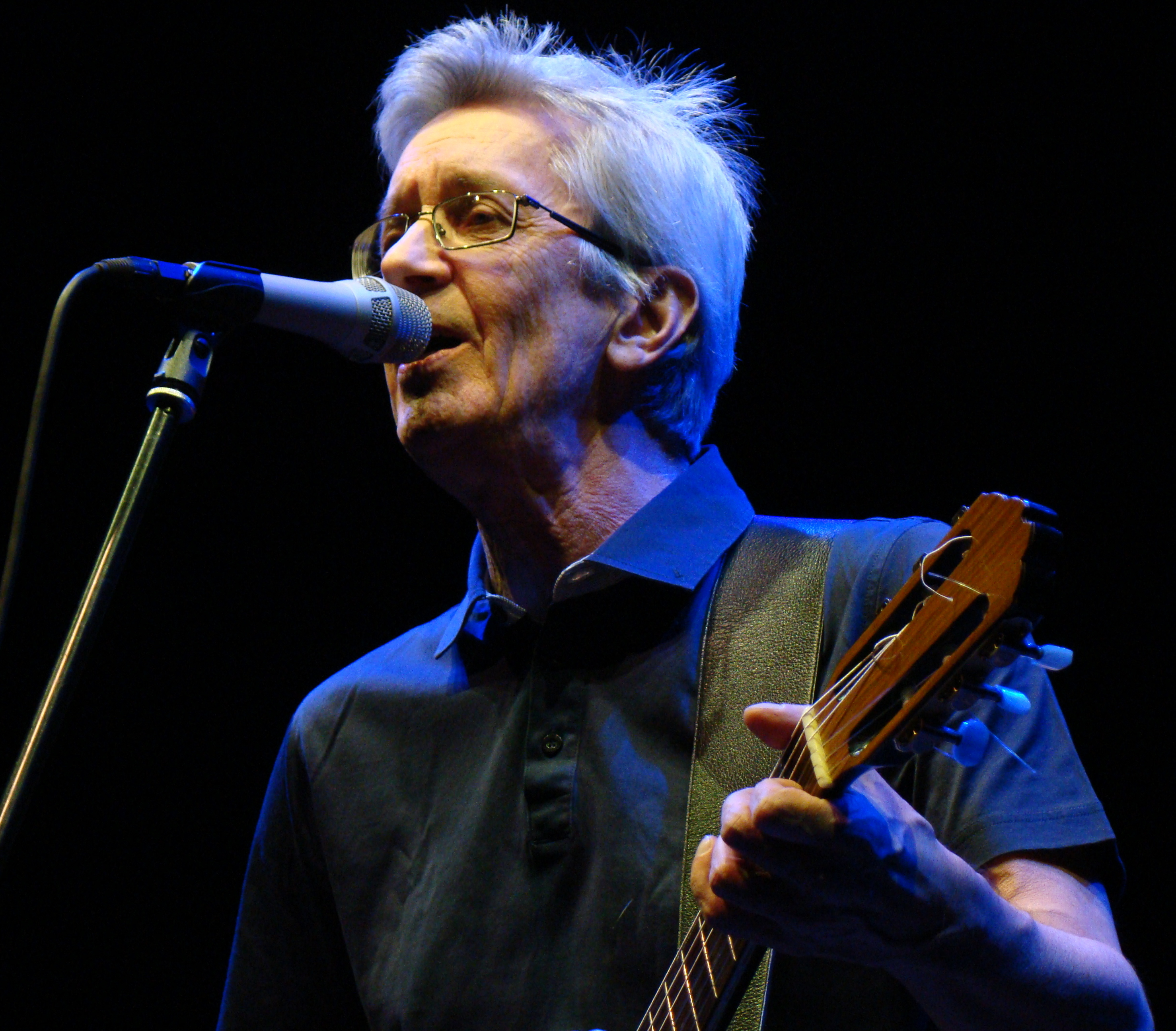 Концерт Константина Никольского в клубе «Yotaspace» (июнь 2015)